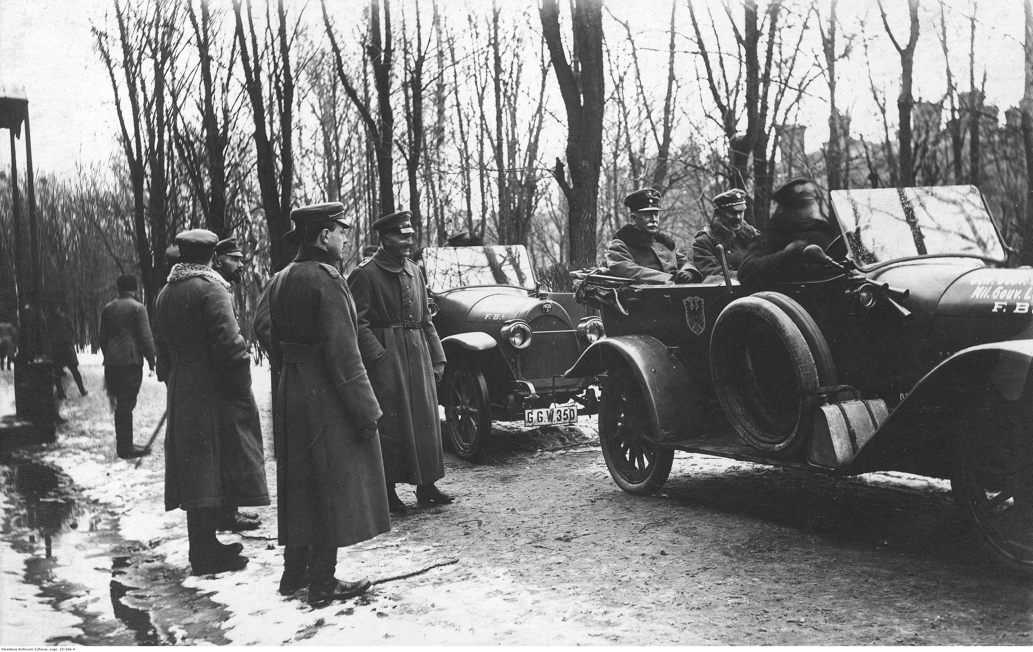 Odjazd generała Felixa von Bartha (1. z lewej w samochodzie) oraz pułkownika Stanisława Szeptyckiego (1. z prawej w samochodzie).